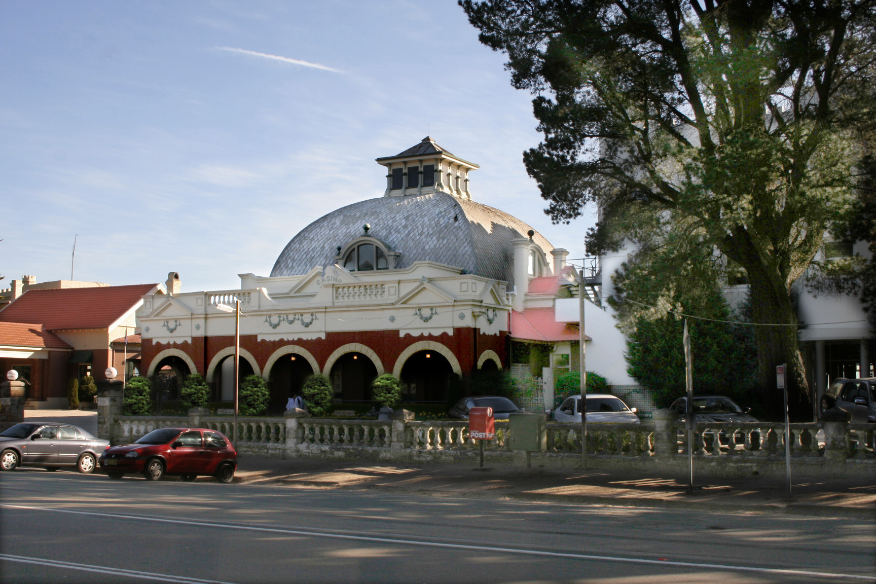 Hydro_Majestic